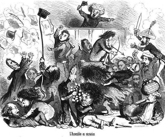 "L'Assemblée en récréation". Caricature de Cham représentant l'Assemblée nationale constituante (4 mai 1848 - 26 avril 1849). On peut notamment reconnaître : André Dupin (à l'extrême gauche, au second plan, les bras levés vers son bonnet de magistrat) ; Félix Pyat menaçant Pierre-Joseph Proudhon (au premier plan, en bas à gauche) ; Alphonse de Lamartine (à genoux, au centre du premier plan) ; Adolphe Crémieux (assis les bras croisés, au centre du premier plan, à côté de Lamartine) ; Victor Considerant (au second plan, entre Dupin et Lamartine, tenant le bonnet de magistrat de Dupin au bout de sa queue voyante, allusion au fouriérisme) ; Adolphe Thiers tirant les cheveux de Pierre Leroux (au centre du second plan, derrière Crémieux) ; le général Cavaignac (à l'extrême droite, coiffé du National) ; le général Lamoricière (coiffé et armé de la même manière que Cavaignac, et situé entre ce dernier et Thiers) ; Bernard Sarrans (assis à l'extrême-droite) ; le président Armand Marrast (tout en haut, brandissant sa cloche) ; Jules Favre (bandant un arc, assis sur la tribune) ; Ledru-Rollin (au troisième plan derrière Lamartine, levant la main droite face à l'explosion des lois et de la Constitution).